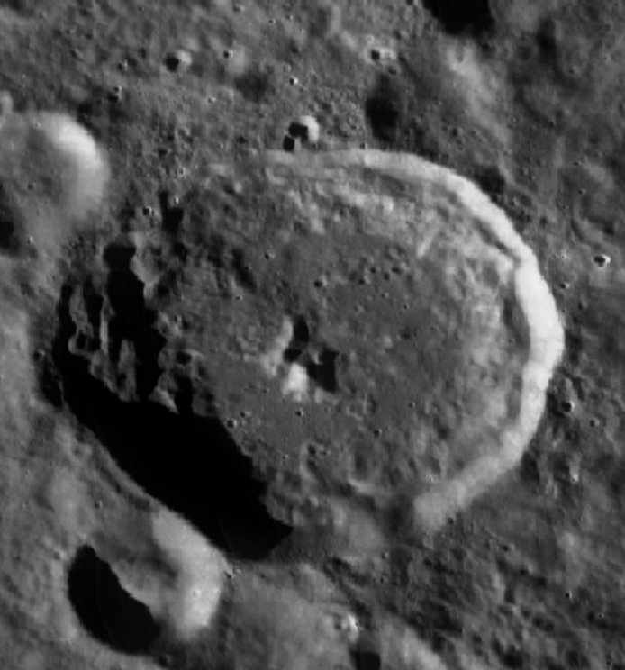 Cráter lunar Störmer. (Imagen LRO)